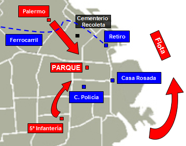 Mapa de operaciones. Revolución de 1890 o del Parque. Buenos Aires. Argentina. En azul las fuerzas del gobierno. En rojo las fuerzas revolucionarias.